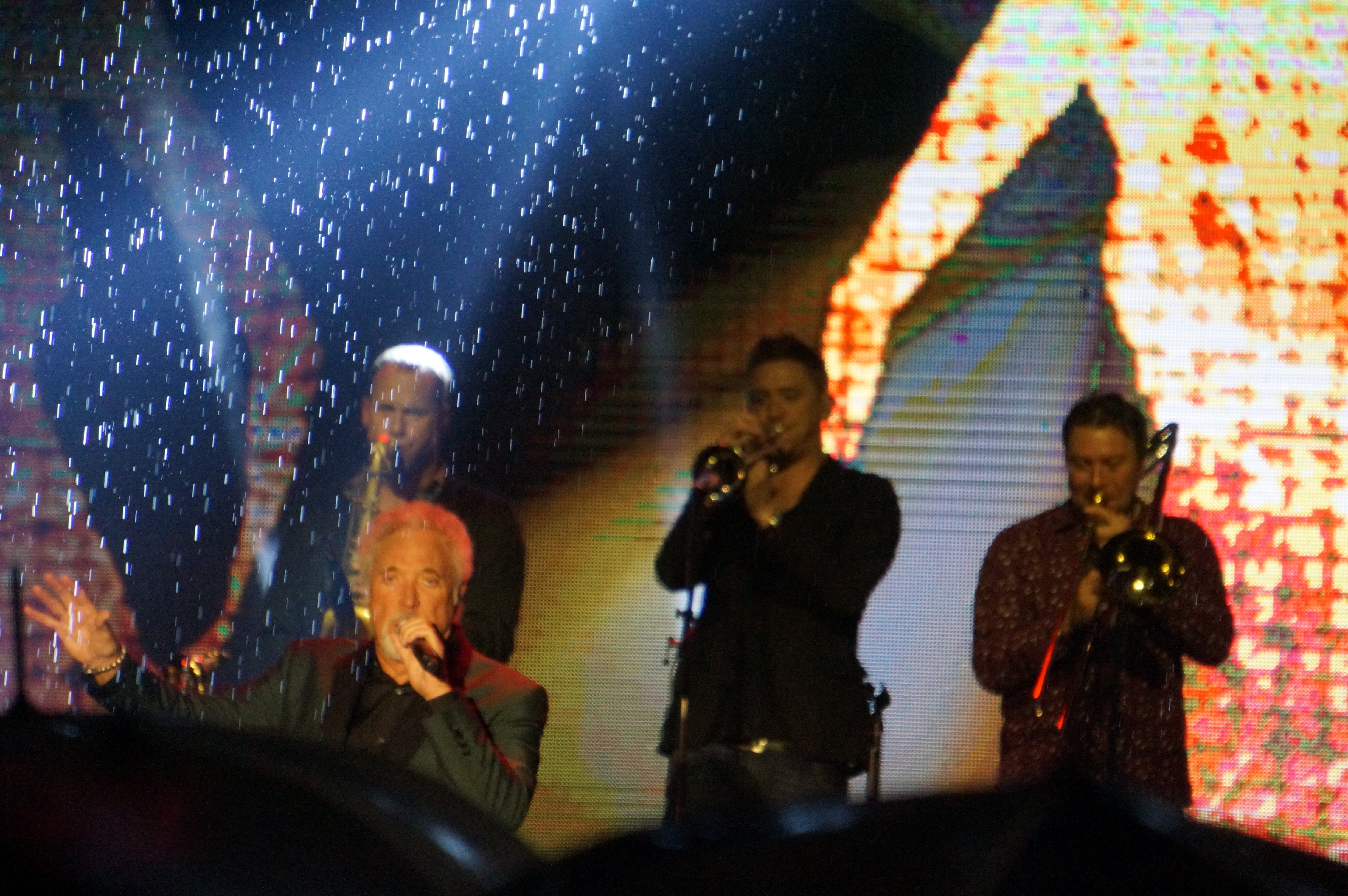 Une nuit à Gyor.